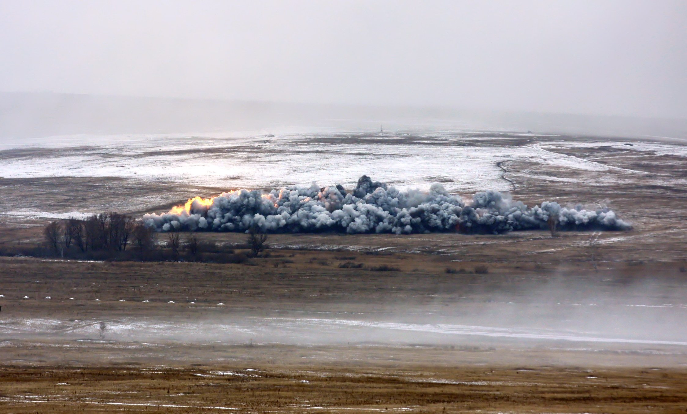 Taktesch Übunge vun Eenheete vun de russesche Stralungs-, Chimie- a Biowaffeschutztruppen um Schichany Übungsterrain - Schwéier Flammewerfer TOS-1A an Aktioun.